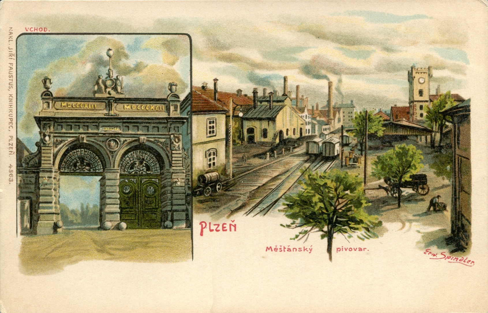 Titel: Měštanský pivovar; Motiv: Verlagsangabe links; Kartennummer: 4363; Signatur: Erw.Spindler; Signaturlage: rechts unten; Gedruckt bei: Georg Faustus Buchh. Pilsen